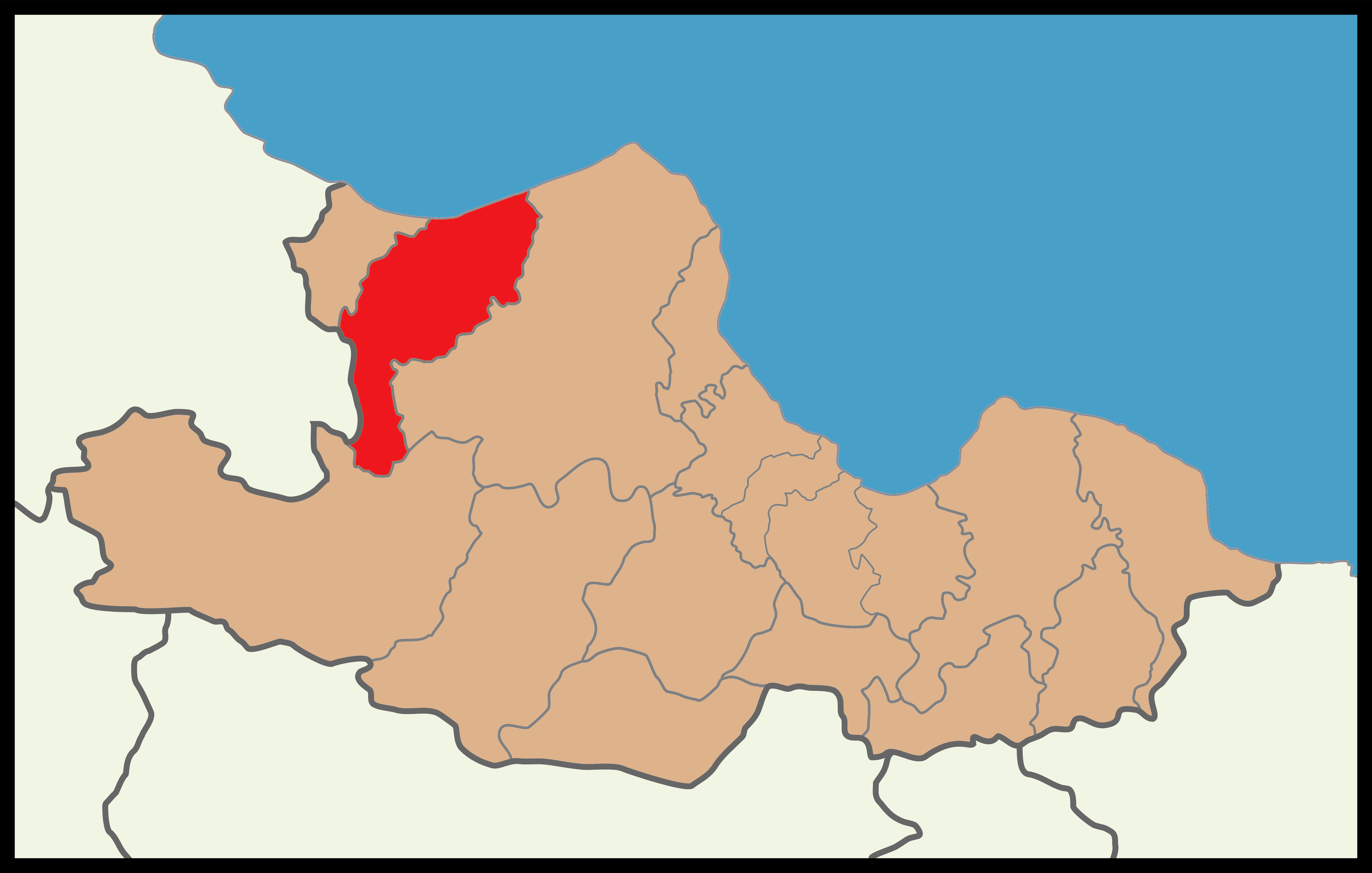 Samsun'un Alaçam ilçesinin 2019 Türkiye yerel seçimleri haritası.